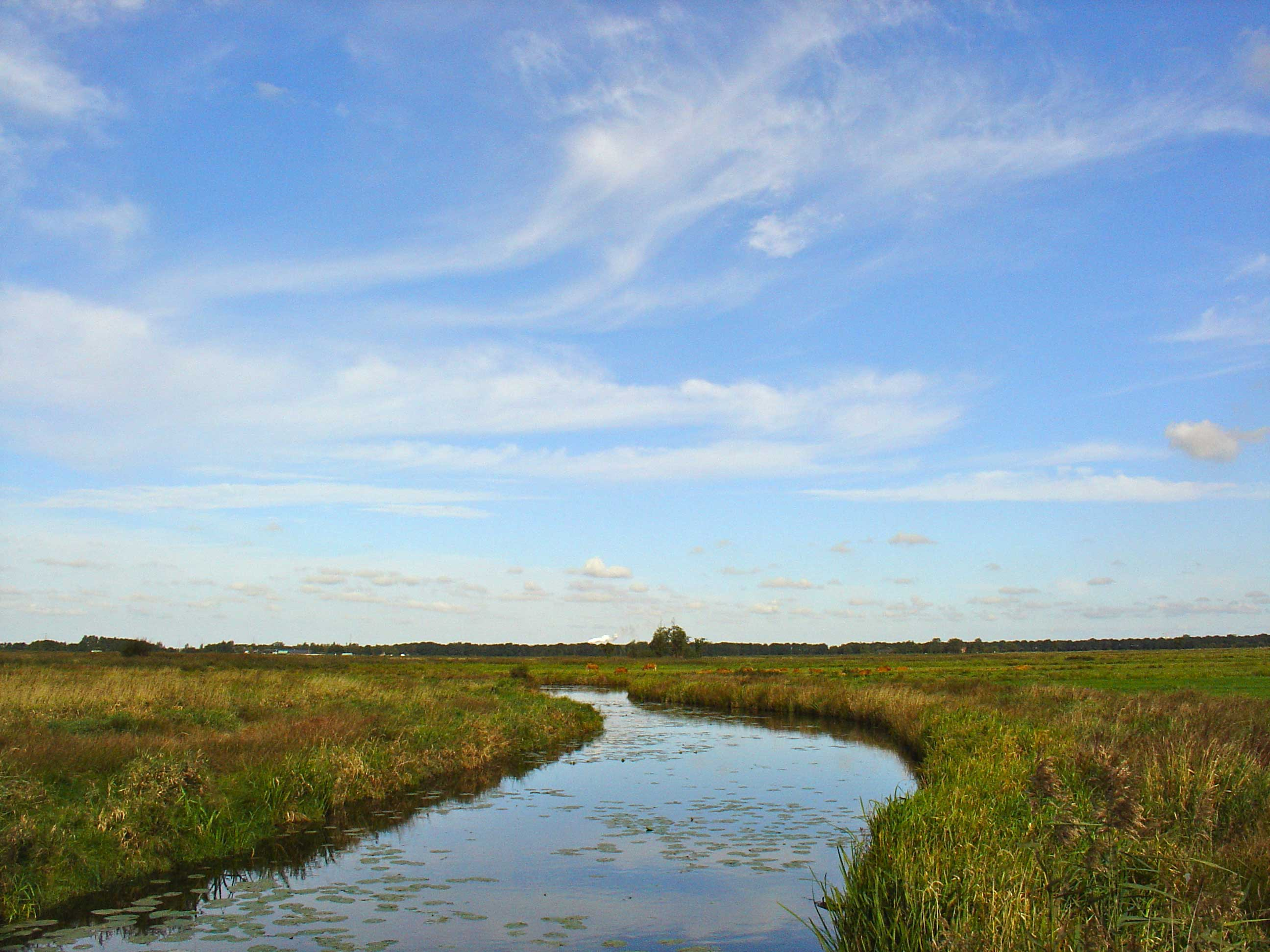 Het Eelderdiep